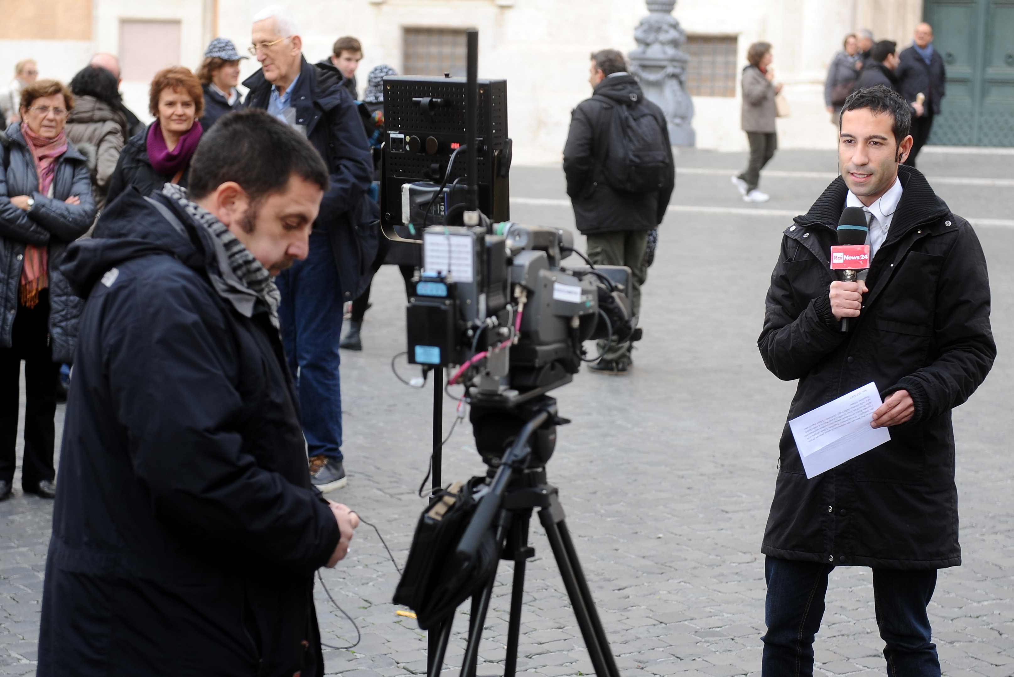 Senio Bonini durante una diretta RaiNews24 da Piazza di Montecitorio.